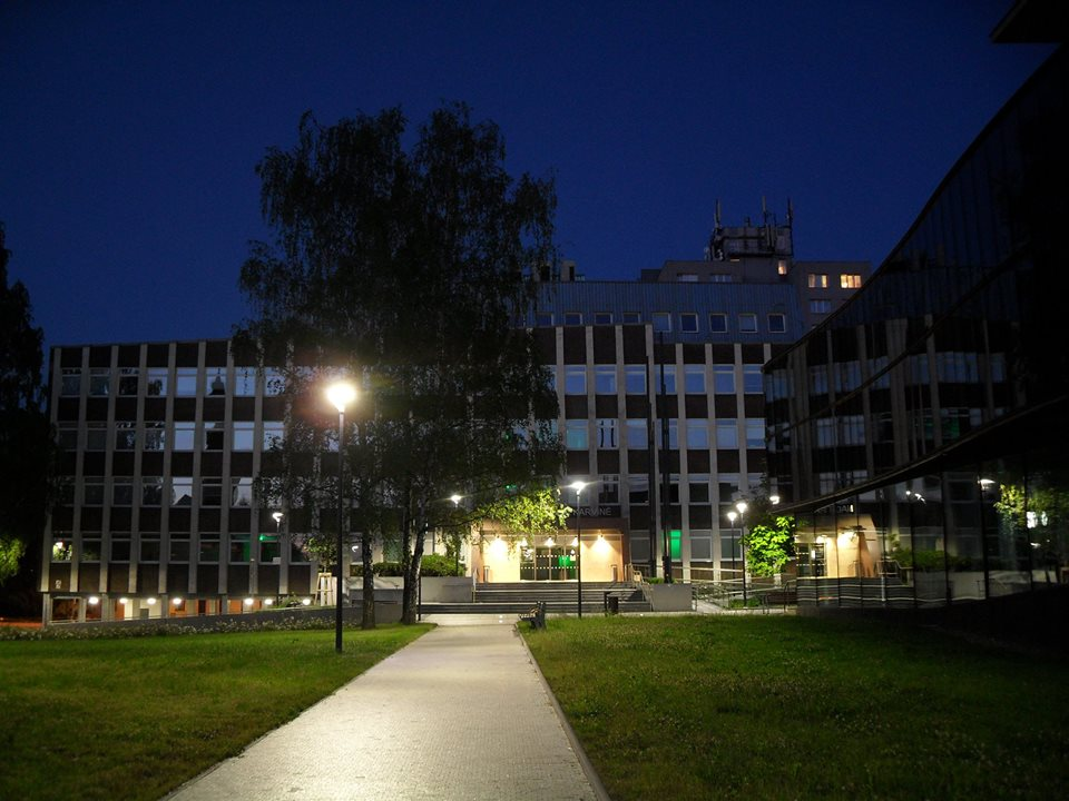 Magistrát města Karviné, budova C, Karola Śliwky 2056/8c.